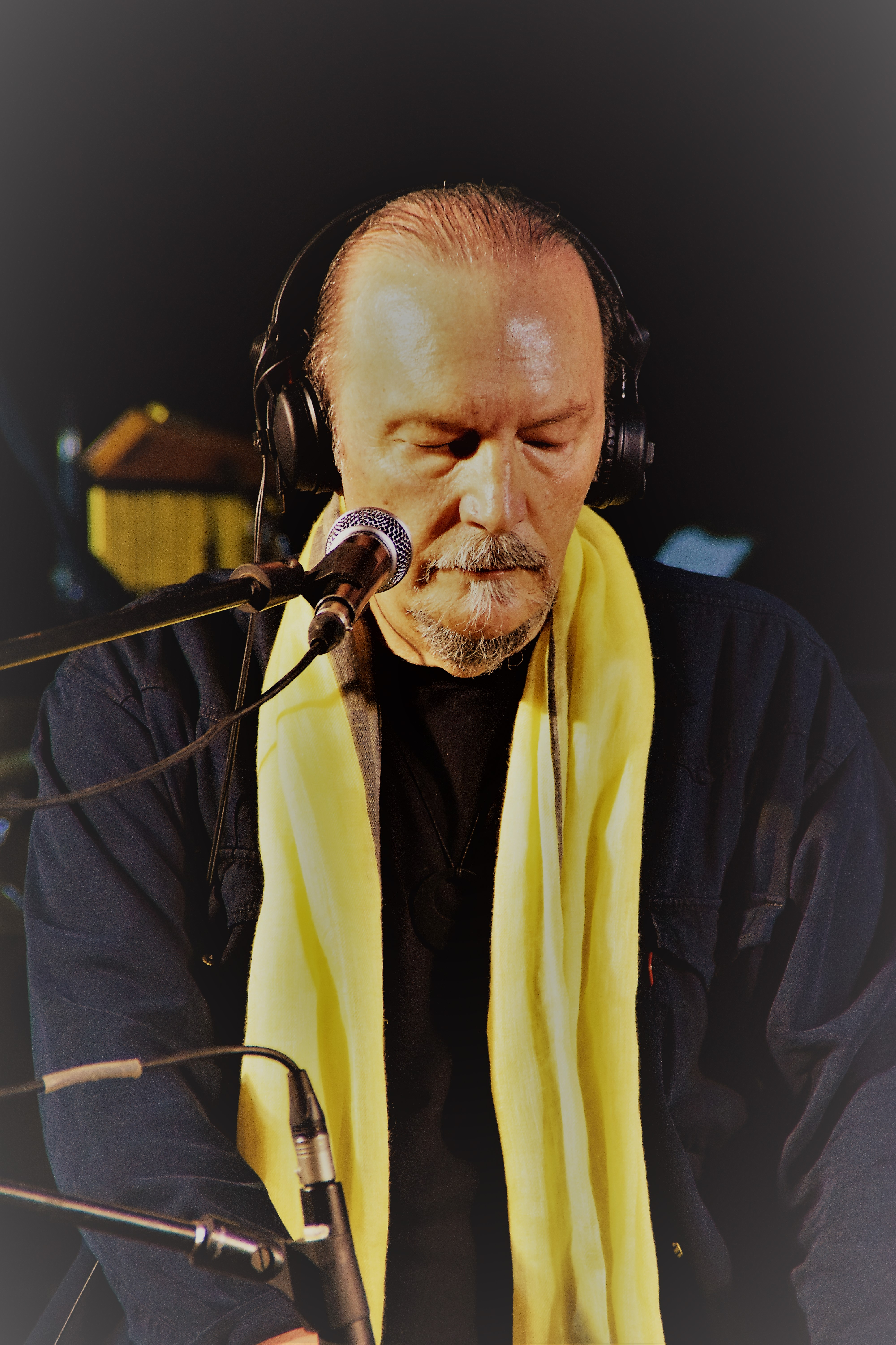 Juri Camisasca in "Spirituality" ad Alba (CN) nel 2017